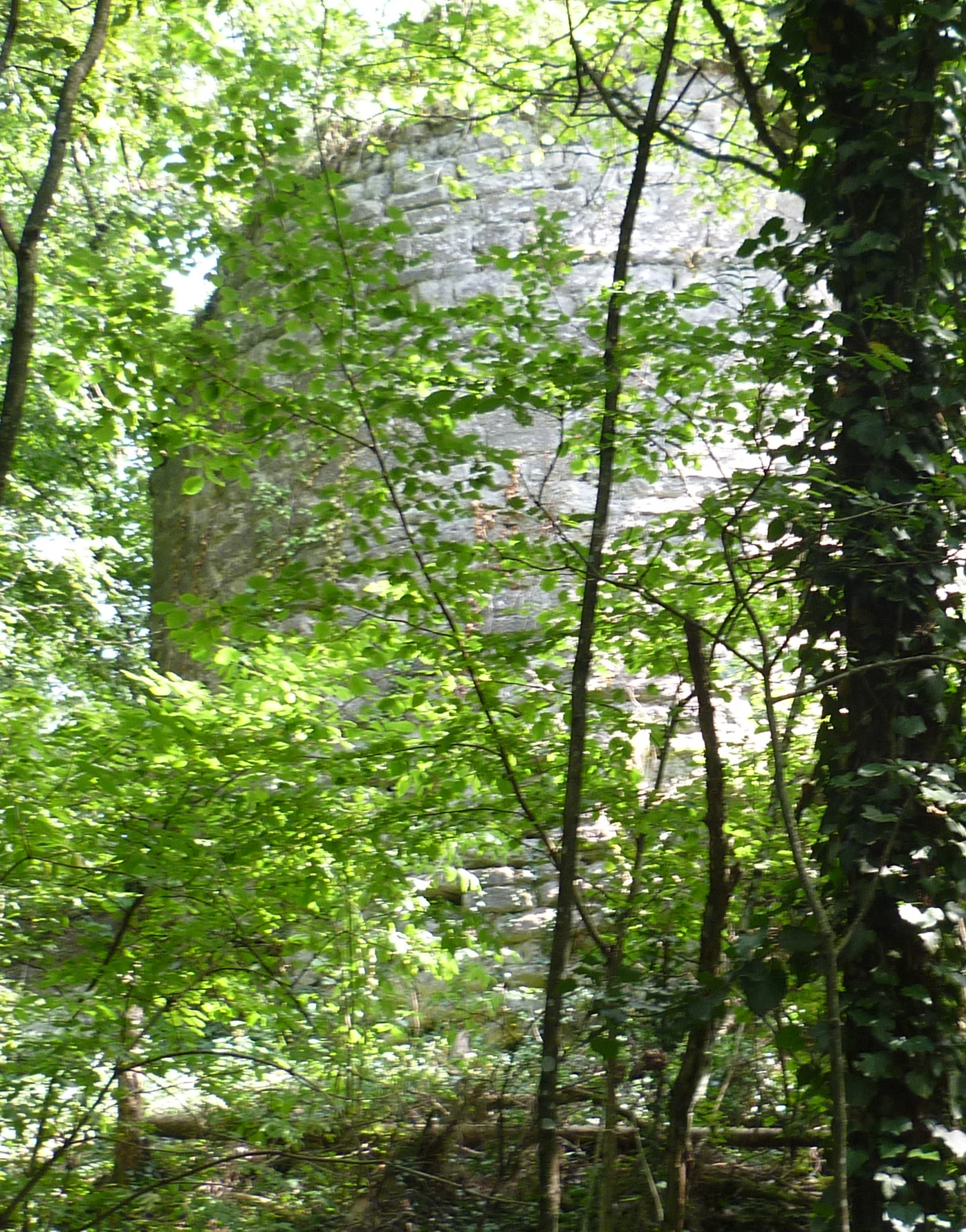 Ruines du château de Crête (XIV° siècle), Versonnex, Haute-Savoie (France)